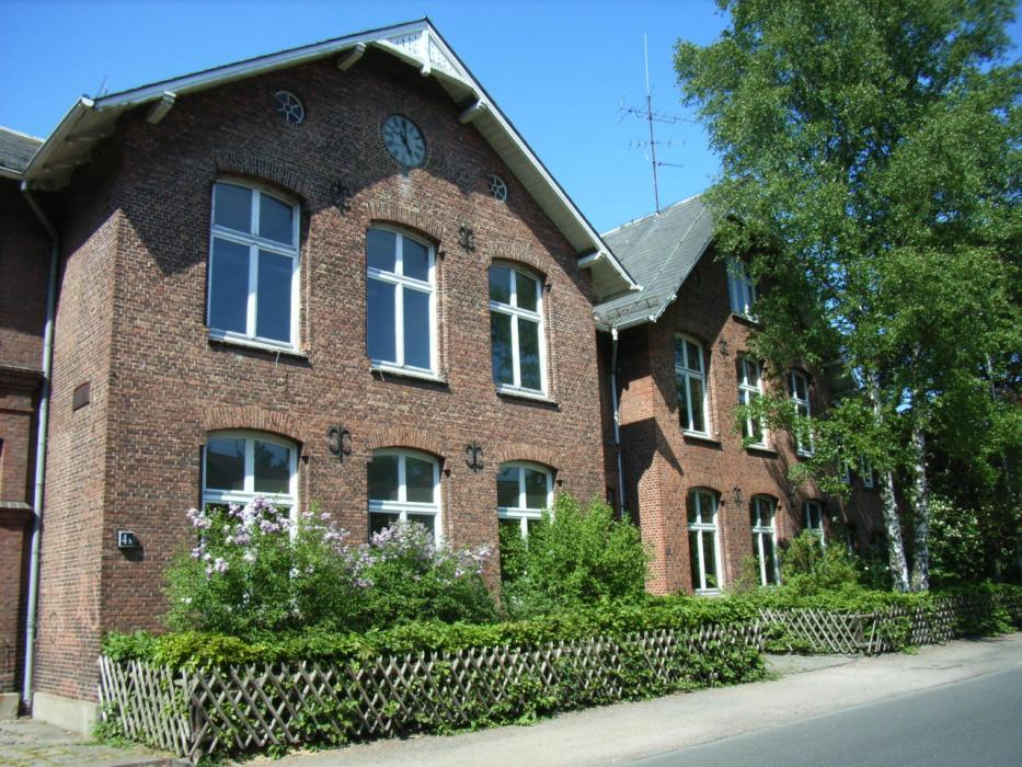 Das denkmalgeschützte Gebäudeensemble im Röbbek 4 bestehend aus Hauptgebäude (erbaut 1871) und Turnhalle (erbaut 1905) mit Nebenräumen (erweitert 1926).This is a photograph of an architectural monument.